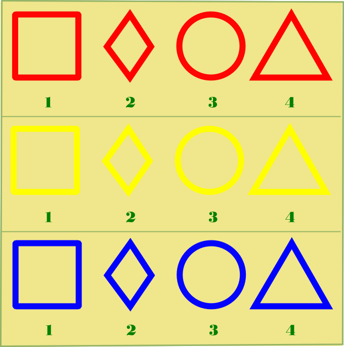 Oznakowanie pojazdów broni pancernej Armii Polskiej na Wschodzie - 2. wersja W broni pancernej stosowano barwne figury geometryczne. Kolory oznaczały pułk: pierwszy pułk dywizji — kolor czerwony drugi pułk dywizji — kolor żółty trzeci pułk dywizji — kolor niebieski Figury geometryczne odpowiadały szwadronom (kompaniom) 2 - (romb) - szwadron dowodzenia 4 - (trójkąt) — 1 szwadron (kompania) 1 - (kwadrat) — 2 szwadron 3 - (koło) — 3 szwadron